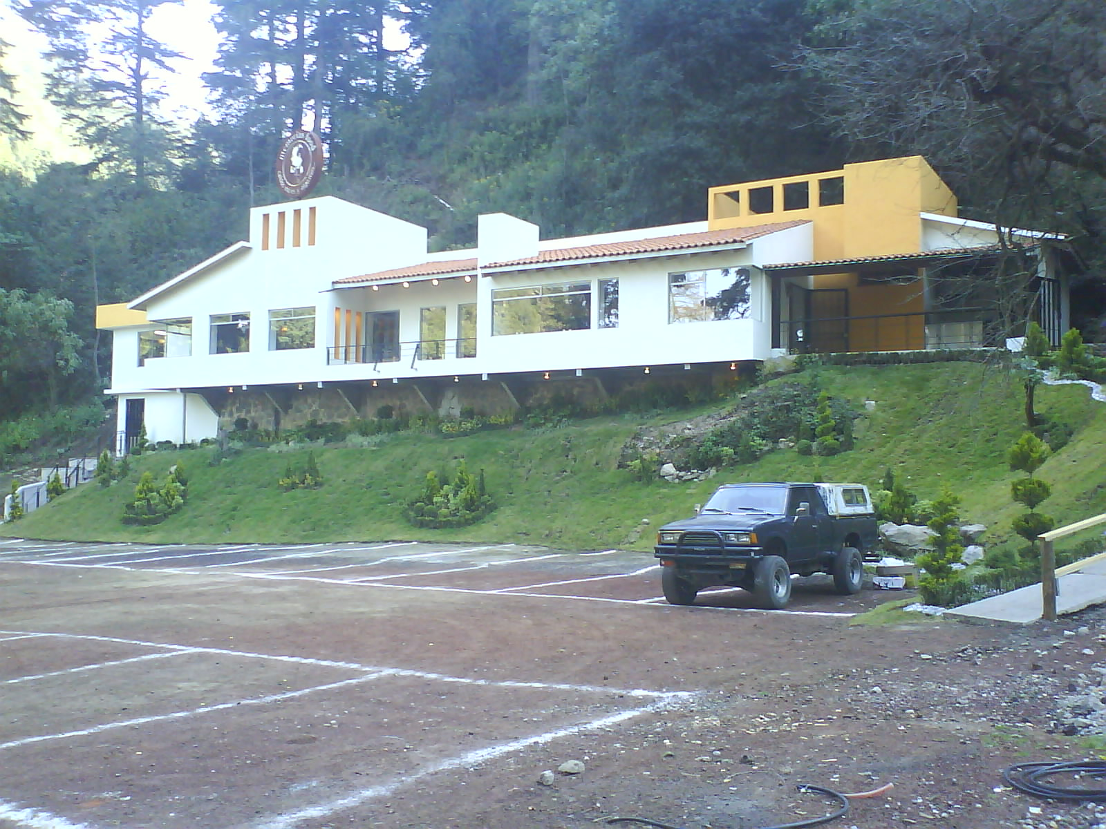 Restarutante del Parque Ecoturístico Dos Aguas